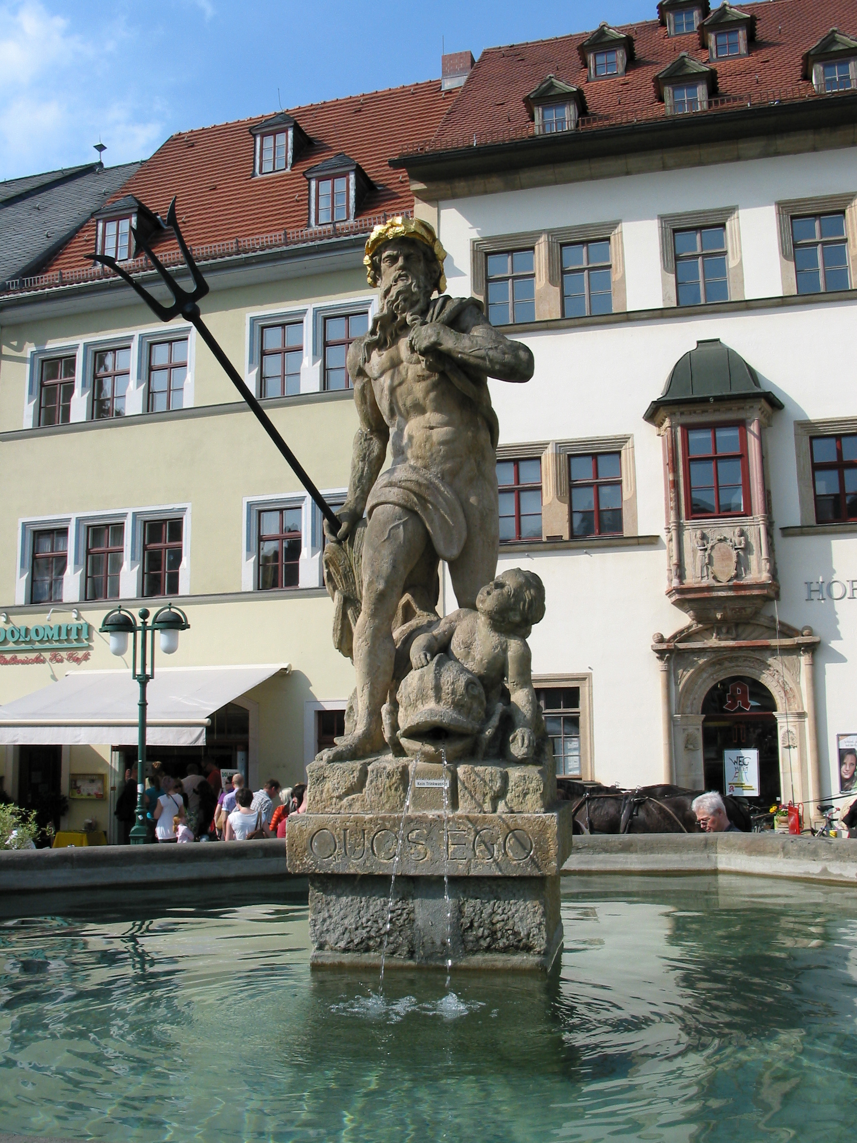 Der Neptun-Brunnen auf dem Marktplatz in Weimar.